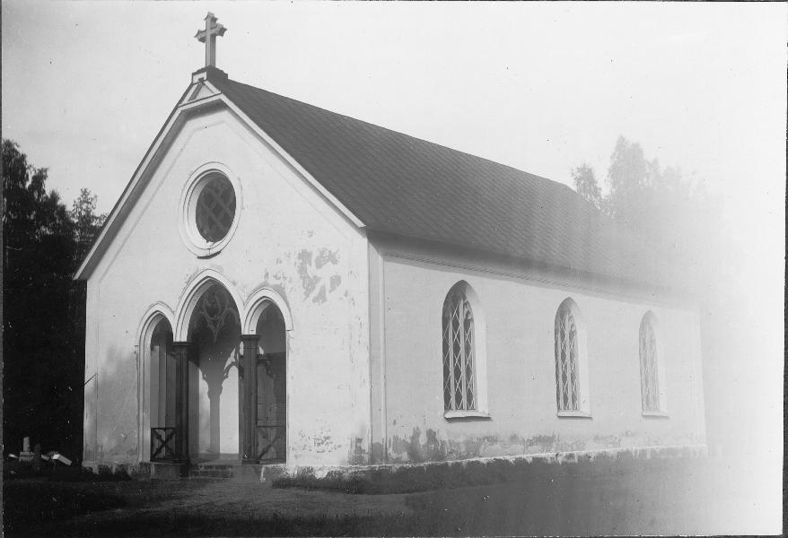 Kyrkan, ritad av Fredrik Wilhelm Scholander 1842, mot sydväst. Kategori: (01) ExteriörerKyrkan, ritad av Fredrik Wilhelm Scholander 1842, mot sydväst.